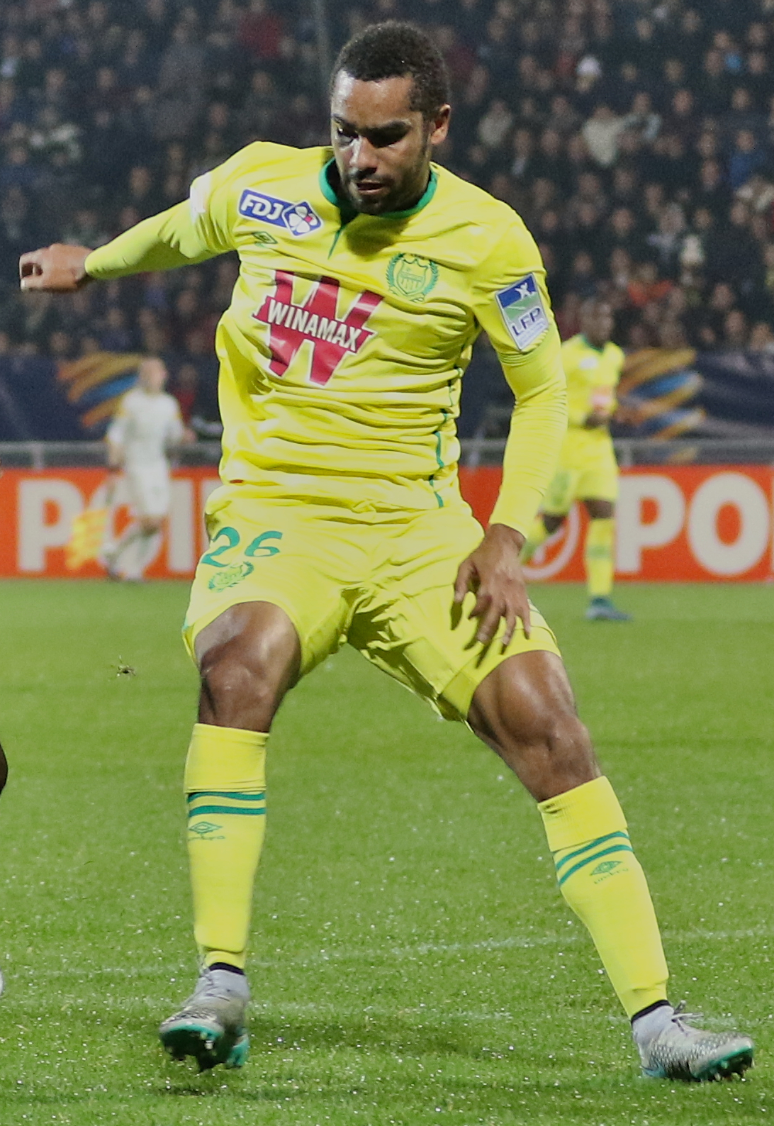 FBBP01 - FCN - 20151028 - Coupe de la Ligue - Koffi Djidji et Papé Sané